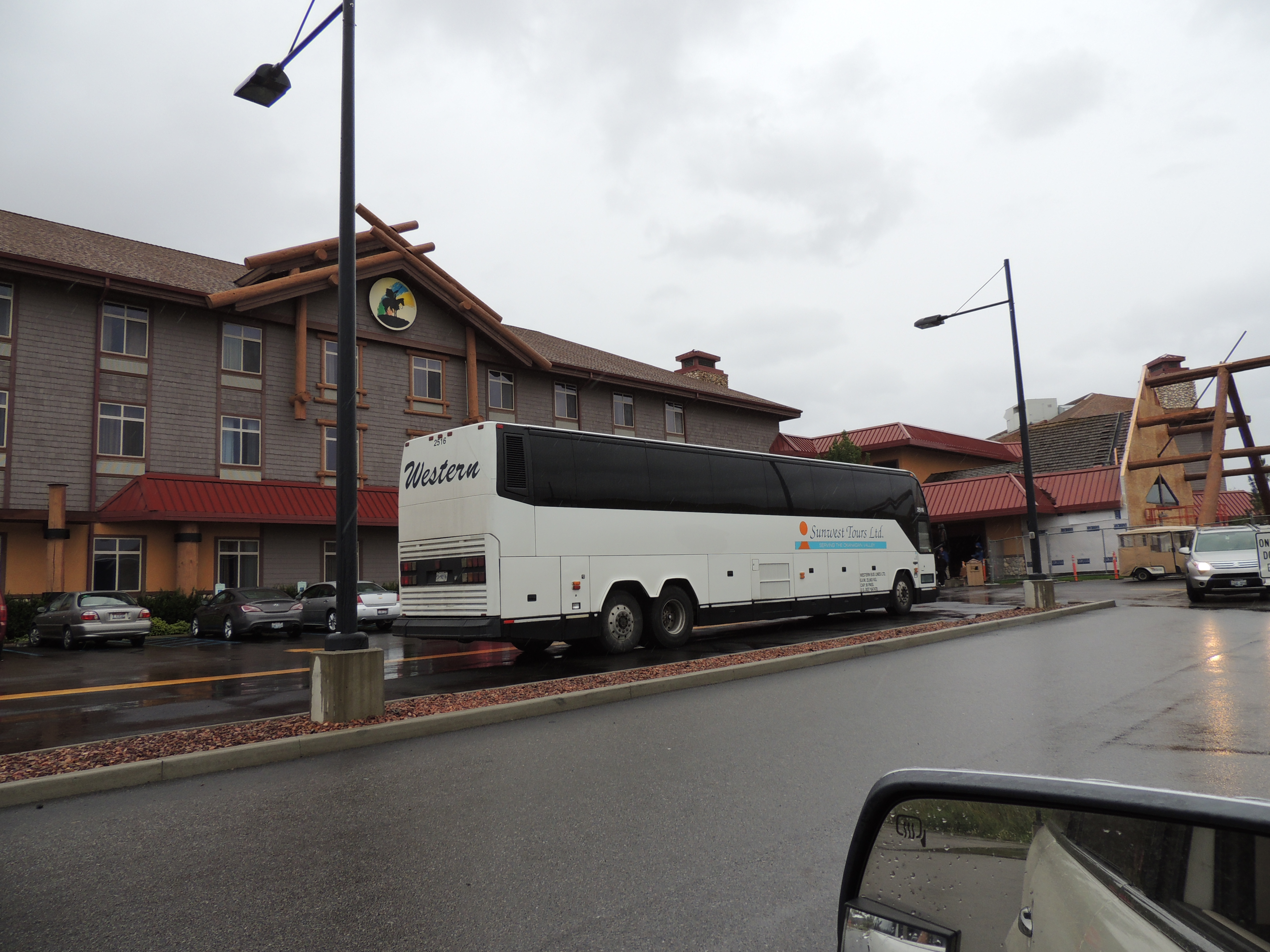 Couer D'Alene Casino